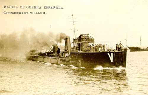 Destructor Villaamil de clase Bustamante en sus pruebas de mar